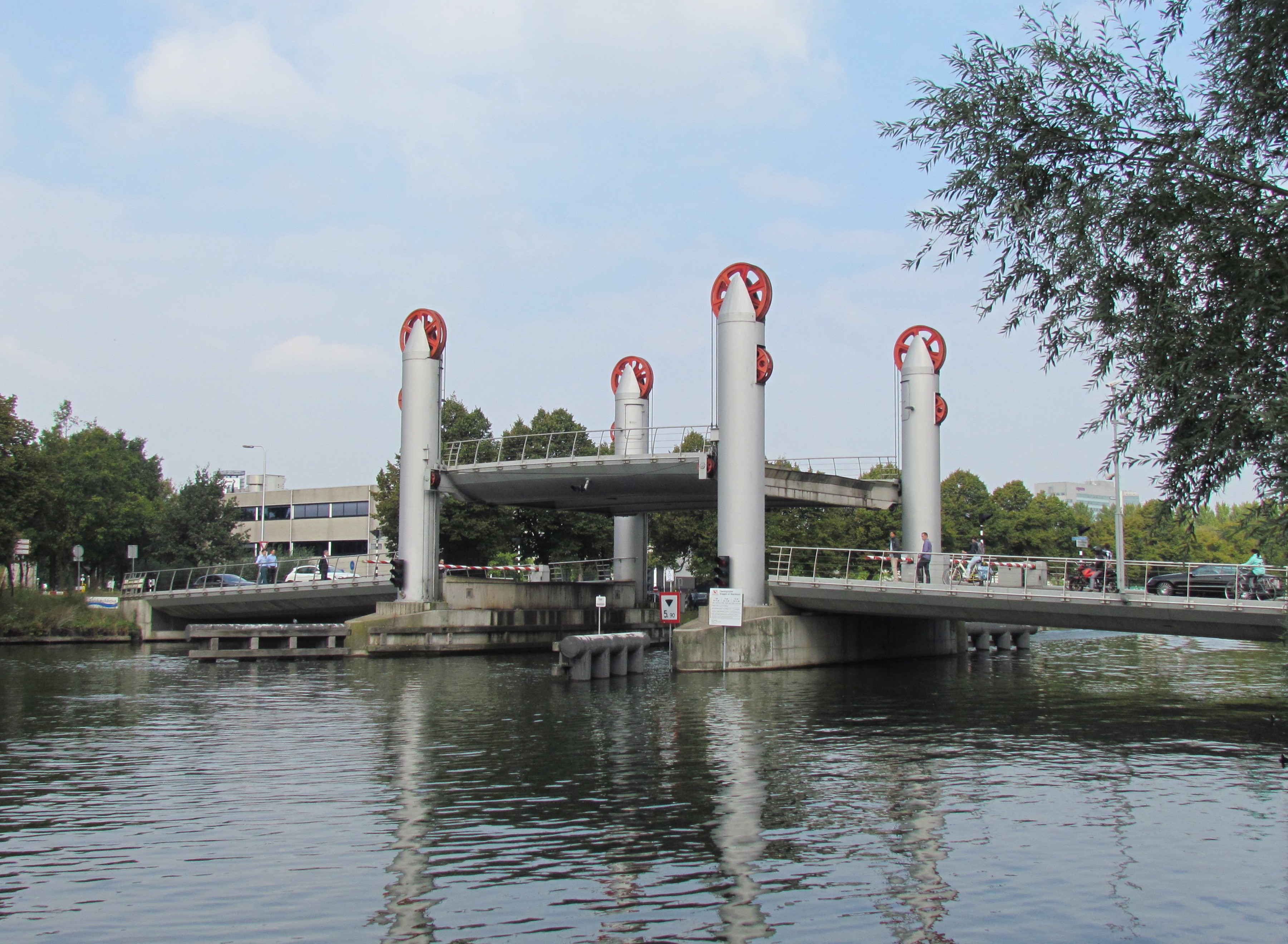 De Liesboschbrug tussen Utrecht en Nieuwegein, over het Merwedekanaal. Hier tijdens de doorvaart van een boot